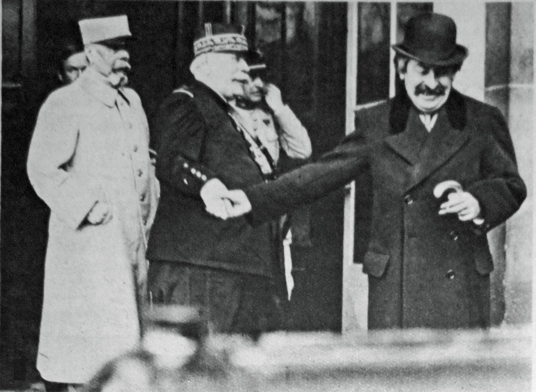 photo du journal Le Miroir N°123 page 8.